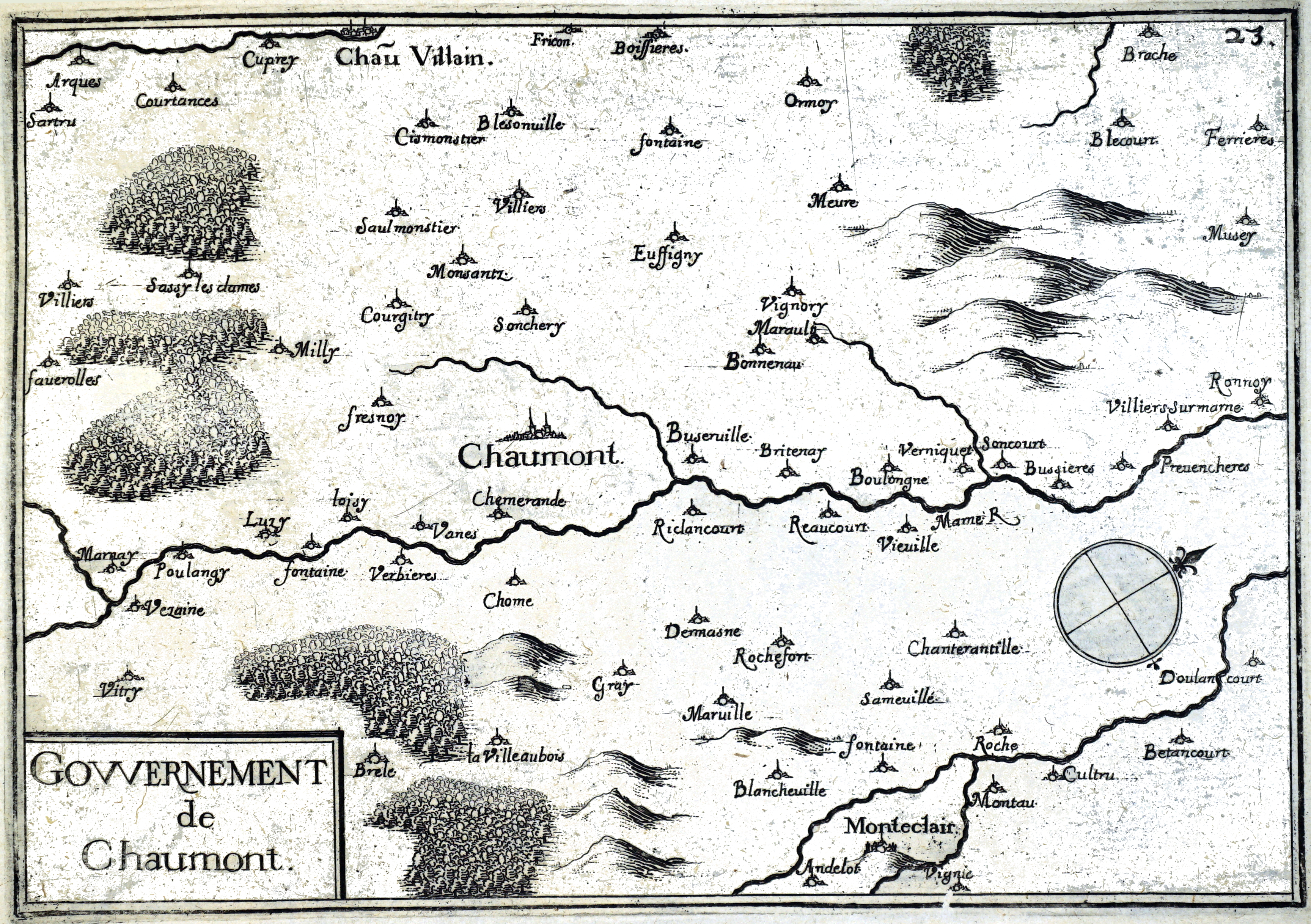 relevé du géographe du roy Tassin.